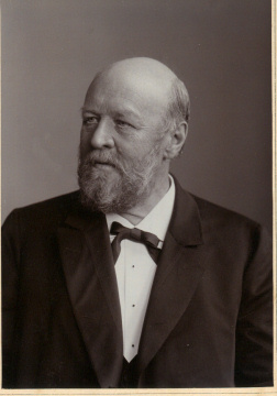 Prof. Dr. Eduard Dobbert, Professor der Kunstgeschichte an der Technischen Hochschule in Charlottenburg